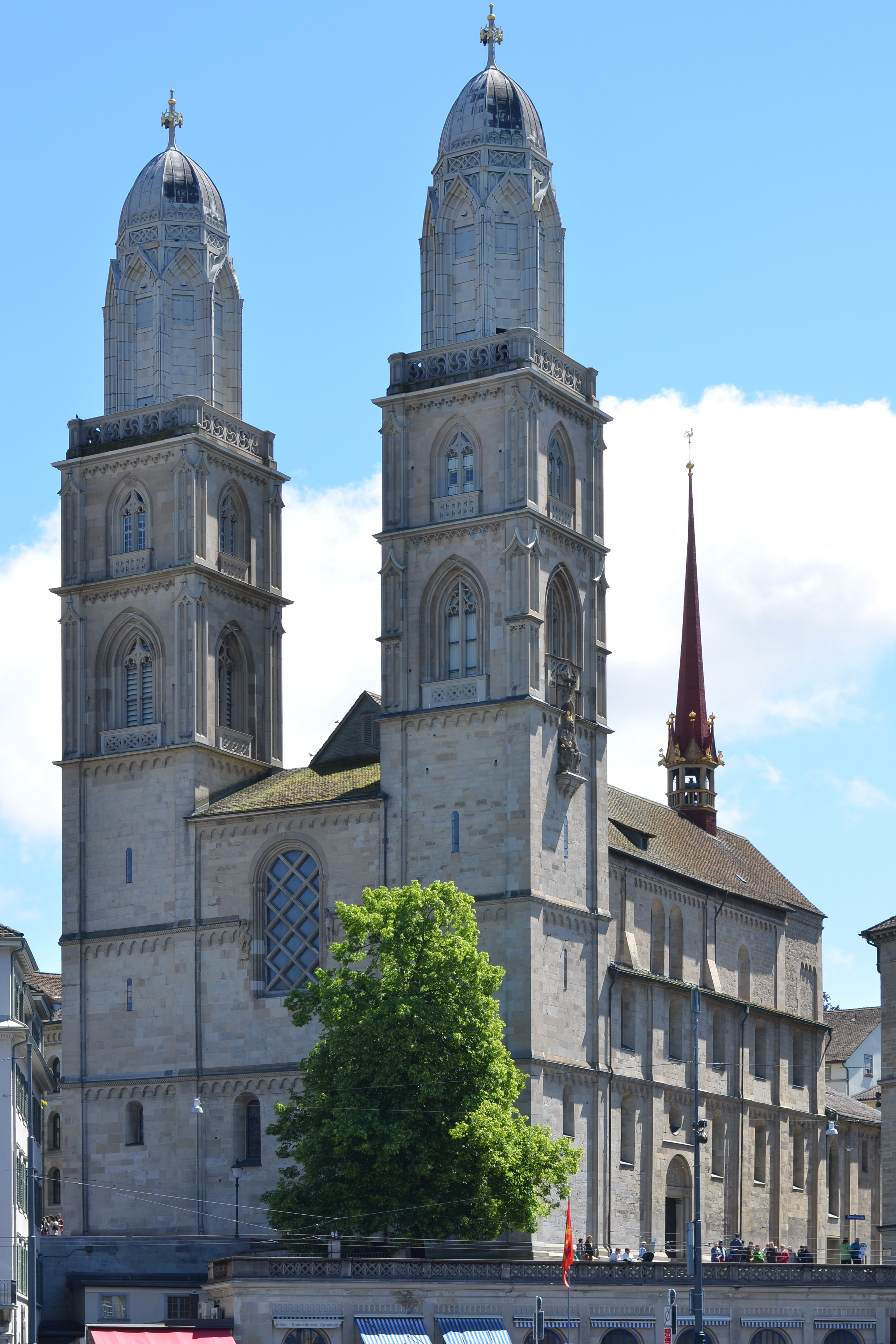 Grossmünster Zürich as seen from Münsterhof (Zürich)